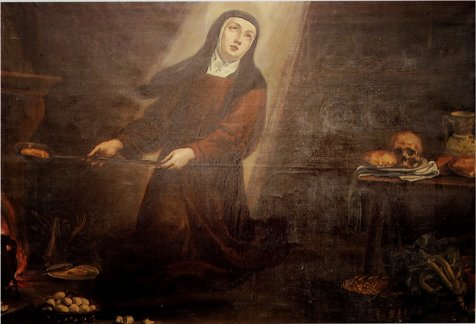 Santa Teresa en la cocina, Ávila, convento de San José